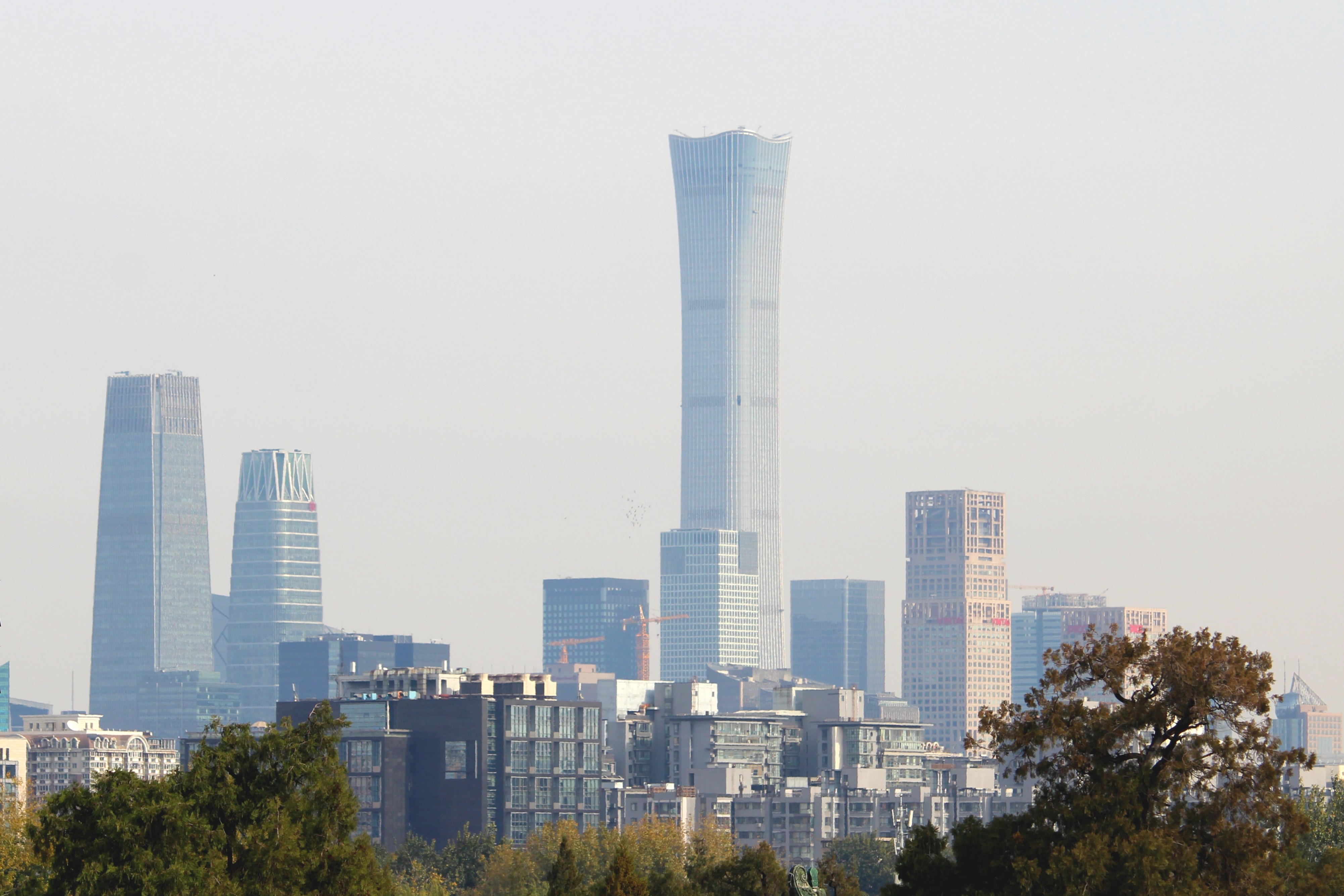 Beijing CBD, le 05 novembre 2018. Vue depuis le Temple du Ciel (天坛 tiān tán) Municipalité de Pékin, Chine